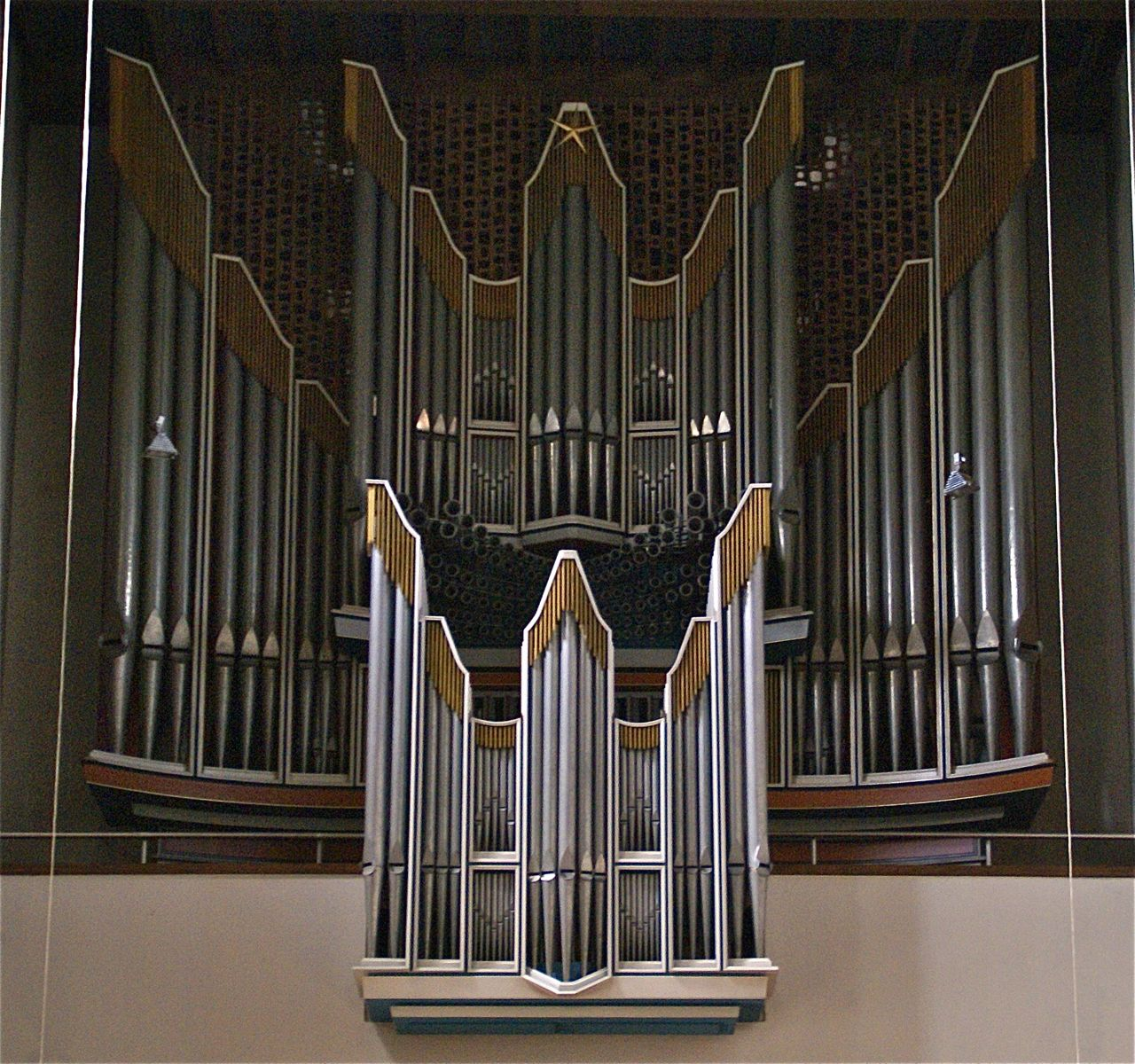 Breil/Klais-Orgel (1960/1989) des Hildesheimer Domes